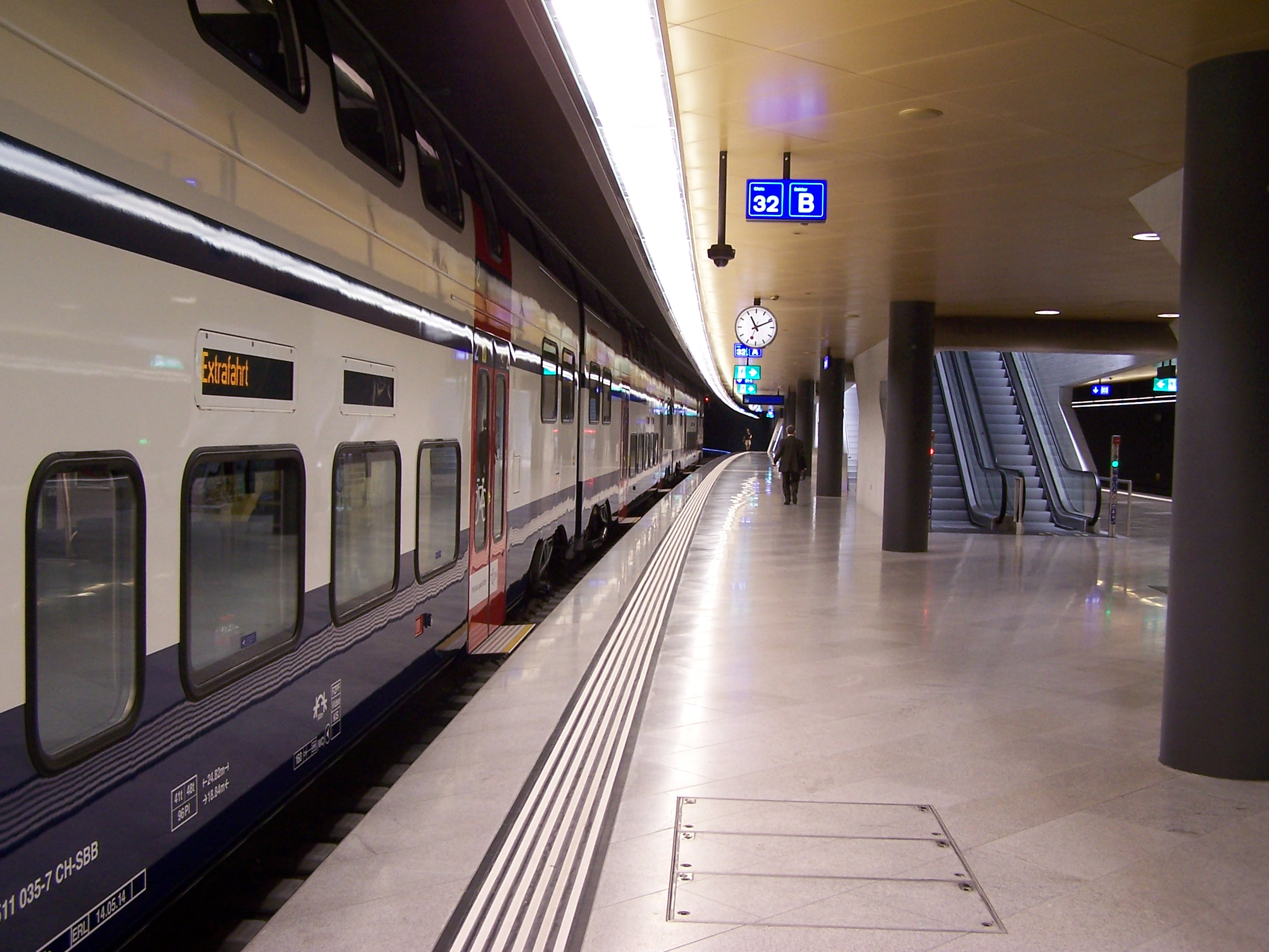 Bahnsteig des Bahnhofs Löwenstrasse mit dem S-Bahn Zürich Zug der 511 035